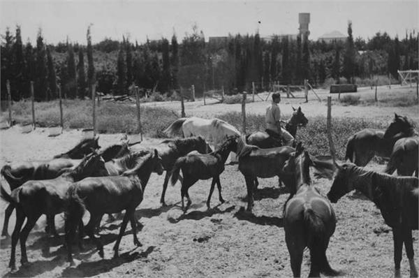 גבעת חיים - גידול סוסים